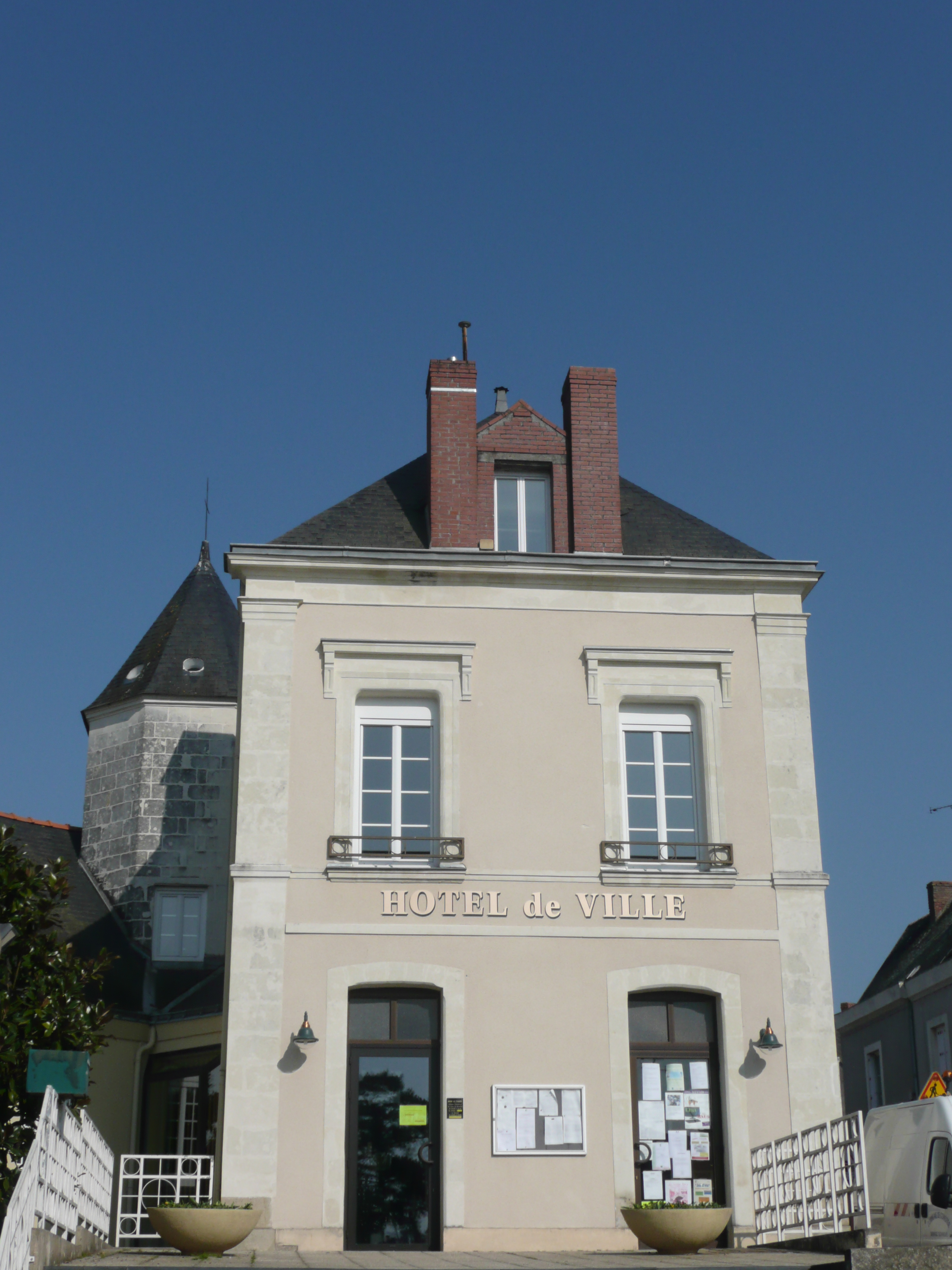 Mairie de Combré